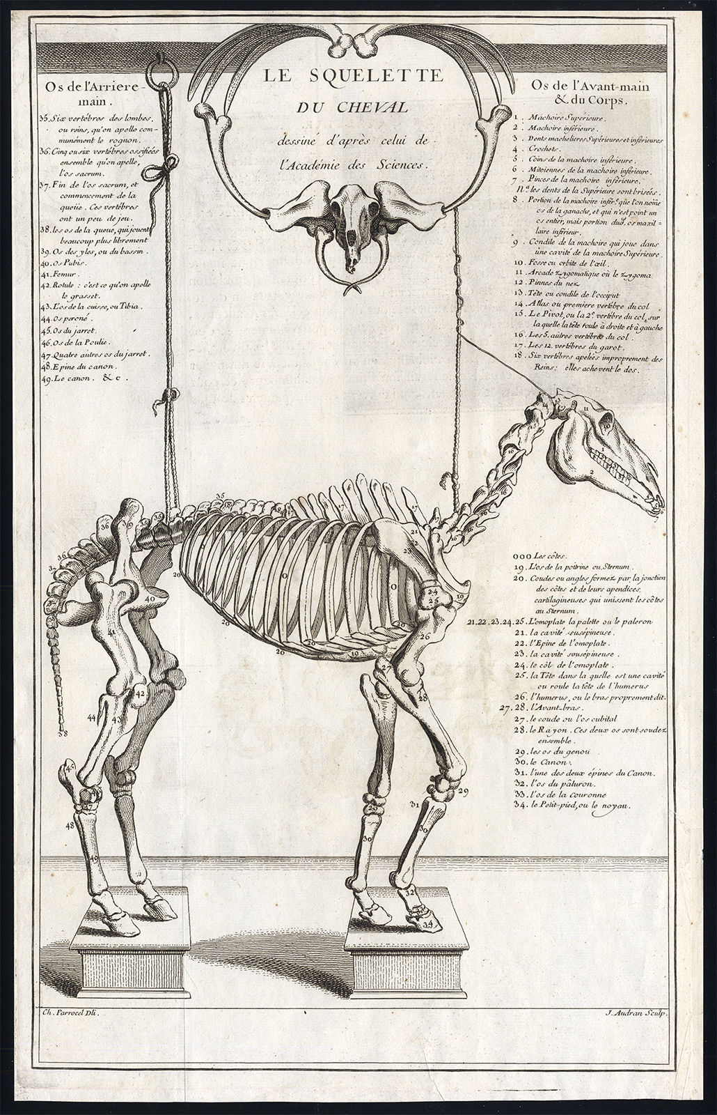 gravure